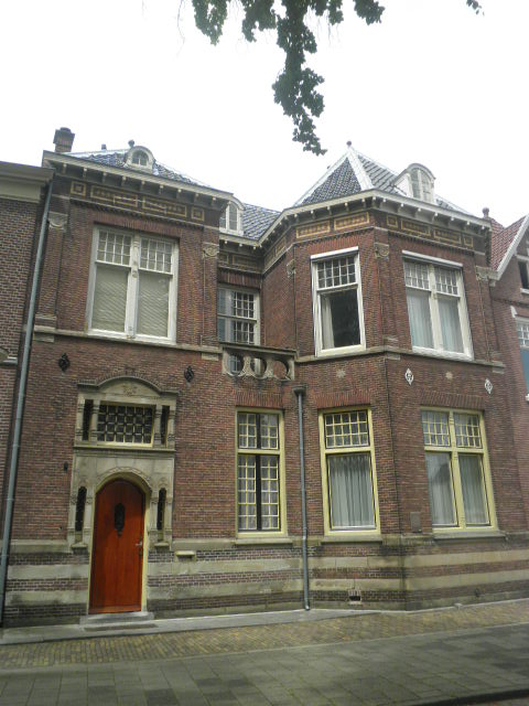 Herenhuis in de stijl van het rationalisme met op oriëntaalse voorbeelden geïnspireerde ornamenten uit 1904-05, gebouwd voor het echtpaar moltzer-boeke